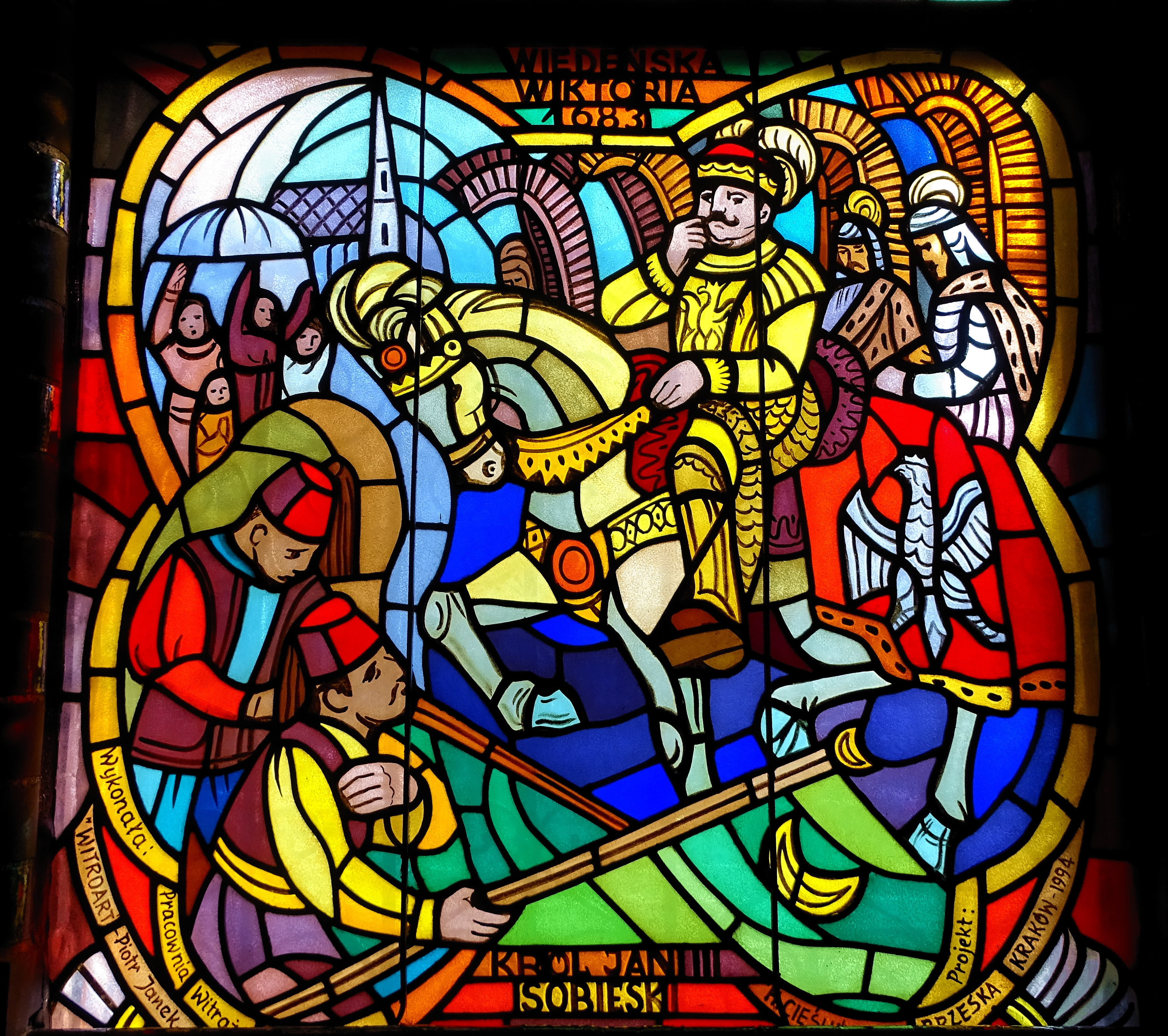 Witraż projektu Haliny Cieślińskiej-Brzeskiej, wykonała pracownia Witroart, Piotr Janek. Kościół św. Elżbiety, Wrocław, Grabiszyńska.